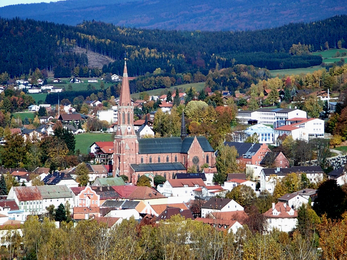 Beschreibung: Zwiesel mit Pfarrkirche St. Nikolaus Quelle: Bild selbst erstellt Datum: 26. Oktober 2006 Autor: Konrad Lackerbeck